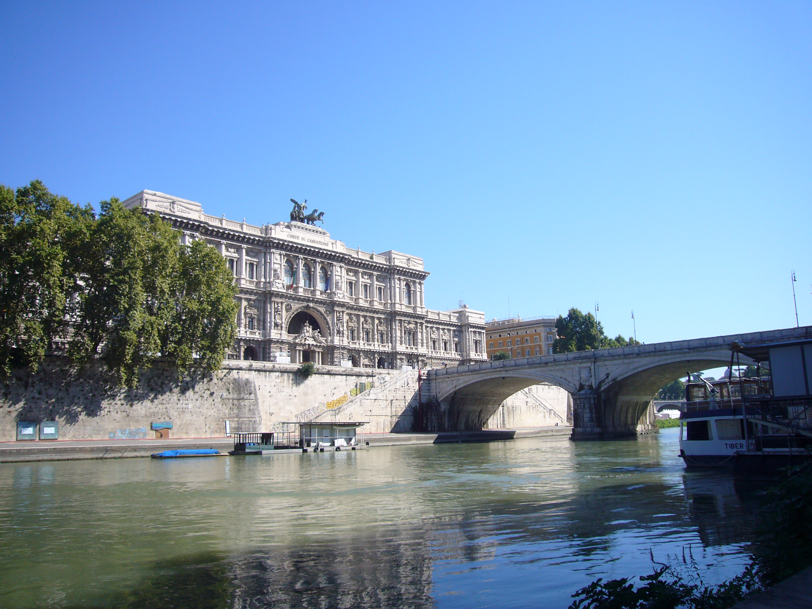 Roma, palazzo di Giustizia e ponte Umberto I dalla banchina del lungotevere Tor di Nona